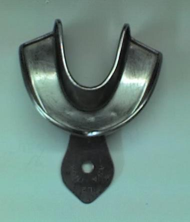 Cubeta de impresión estándar metálica inferior